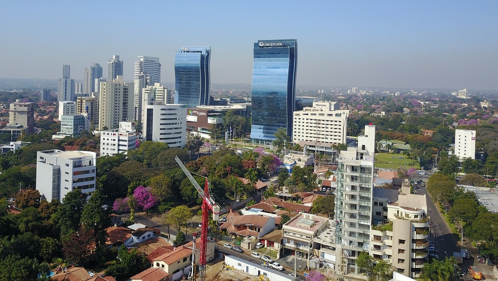 Asunción Paraguay